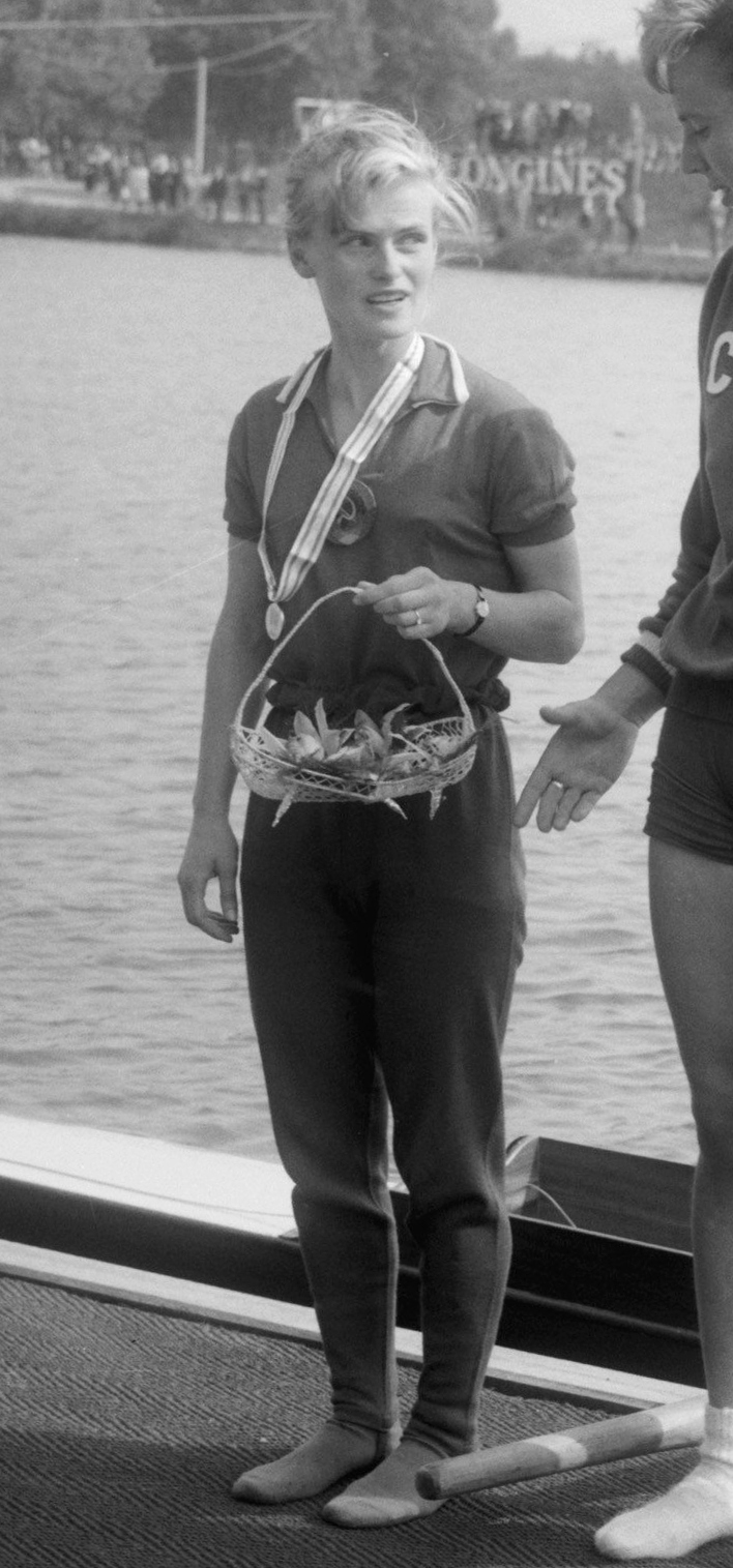 Europese Roeikampioenschappen dames 1966 op de Bosbaan in Amsterdam. Huldiging van de Russische vier met stuurvrouw